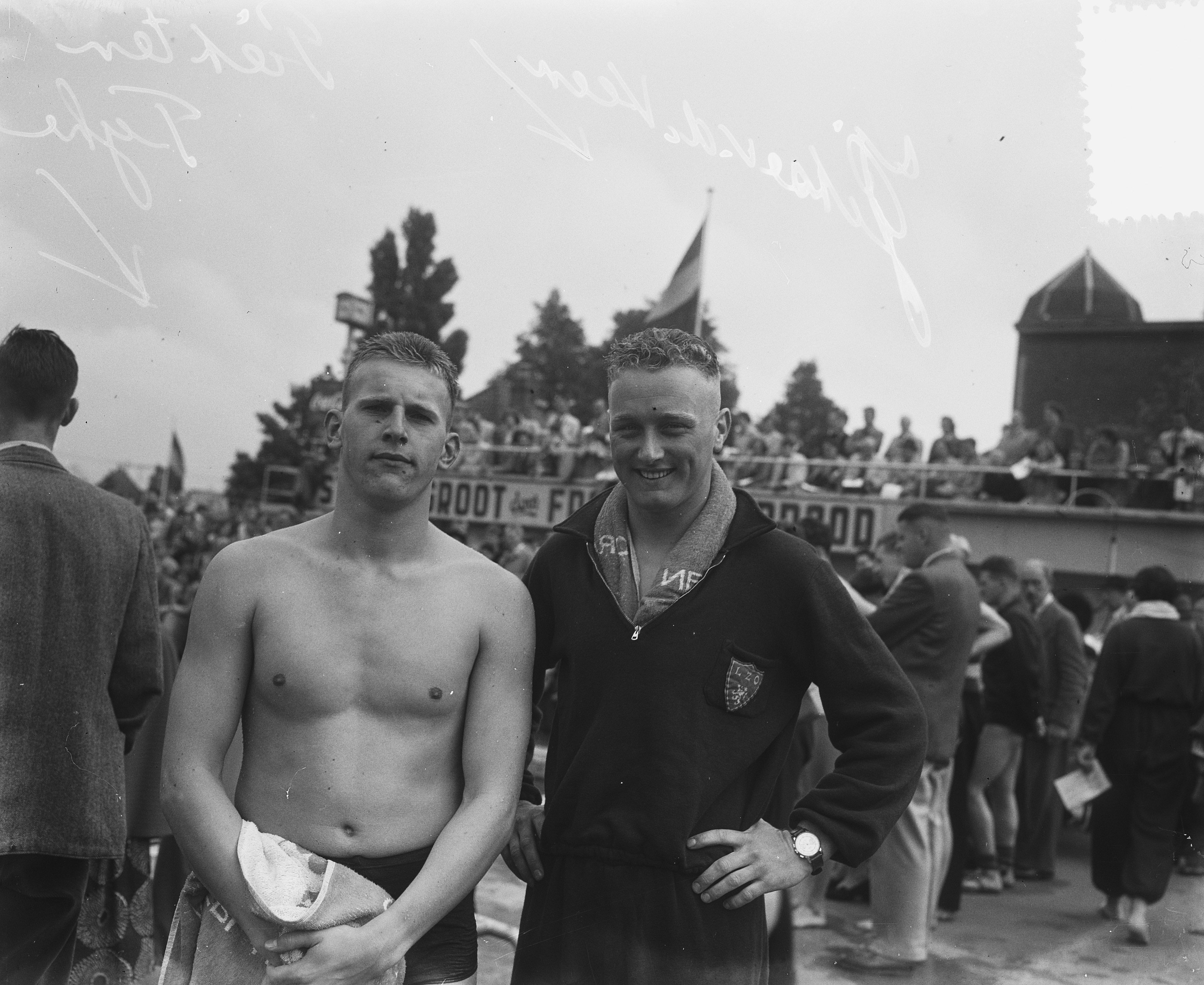 Collectie / Archief : Fotocollectie Anefo Reportage / Serie : Sportkoppen Zwemmen Beschrijving : Piet ten Tijhe en Jitse van der Veen (rechts) Datum : 15 juni 1952 Trefwoorden : sport, zwemmen Persoonsnaam : Thije, Piet ten, Veen, Jitse van der Fotograaf : Pot, Harry / Anefo, [onbekend] Auteursrechthebbende : Nationaal Archief Materiaalsoort : Glasnegatief Nummer archiefinventaris : bekijk toegang 2.24.01.09 Bestanddeelnummer : 905-1647